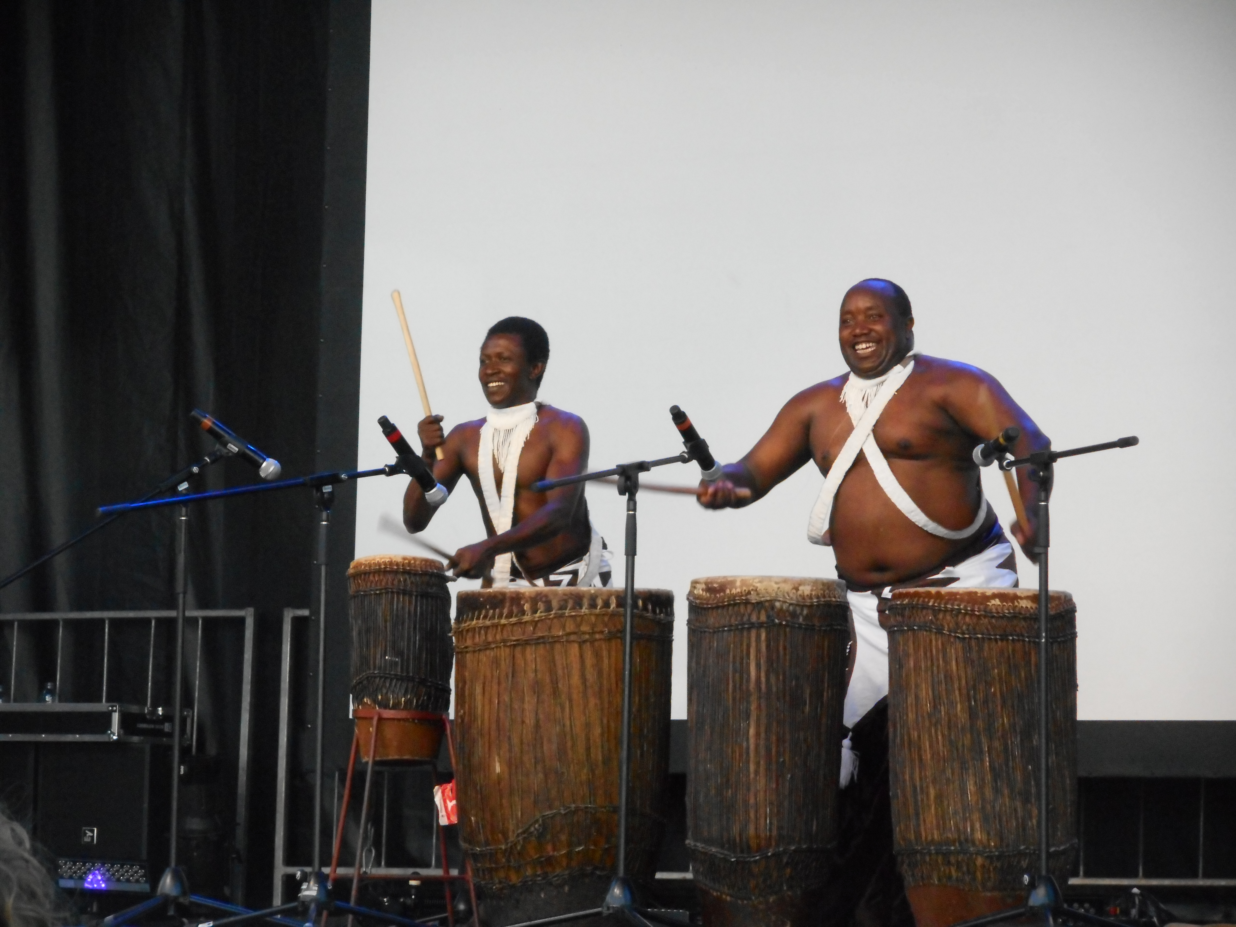 Spectacle sur la grande scène de la place des Festivals, faisant suite au Défilé de l'amitié Nuestroamericana Le groupe Komezinganzo en représentation de la communauté rwandaise - directeur artistique : Vincent Nsengiyumva - Les musiciens utilisent des ingomas, tambours couverts d'une peau d'un animal tendue, plus larges au sommet qu'à la base